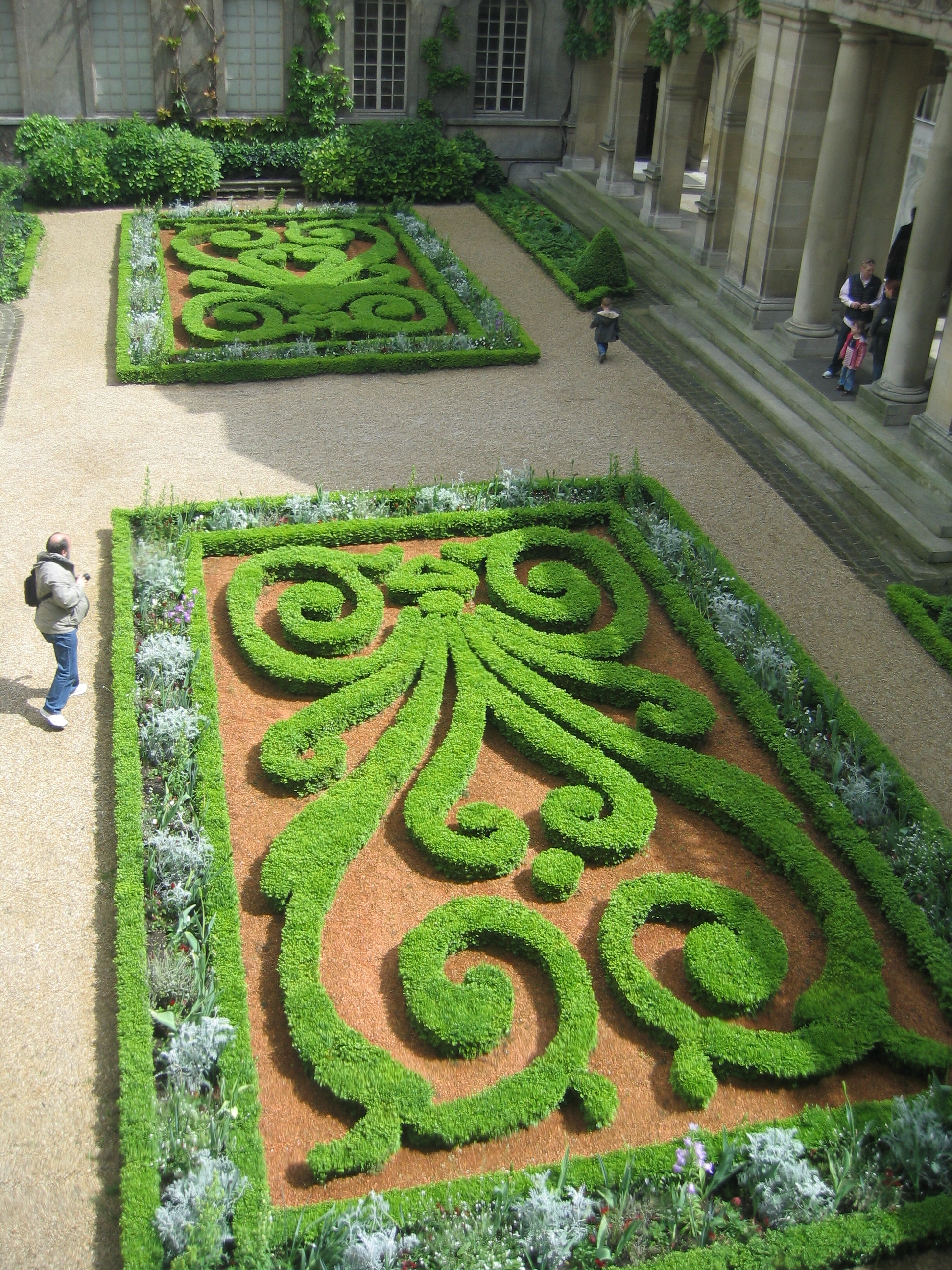 Le musée Carnavalet à Paris, ce dernier retrace l'histoire de la ville de Paris